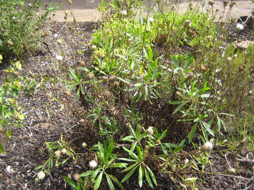 Polycarpaea filifolia. Endemismo canario (La foto se correspone con un Cheirolophus fotografiado en el Centro de Visitantes del Parque Nacional de Garajonay en Juego de Bolas, no es una Polycarpaea filifolia)